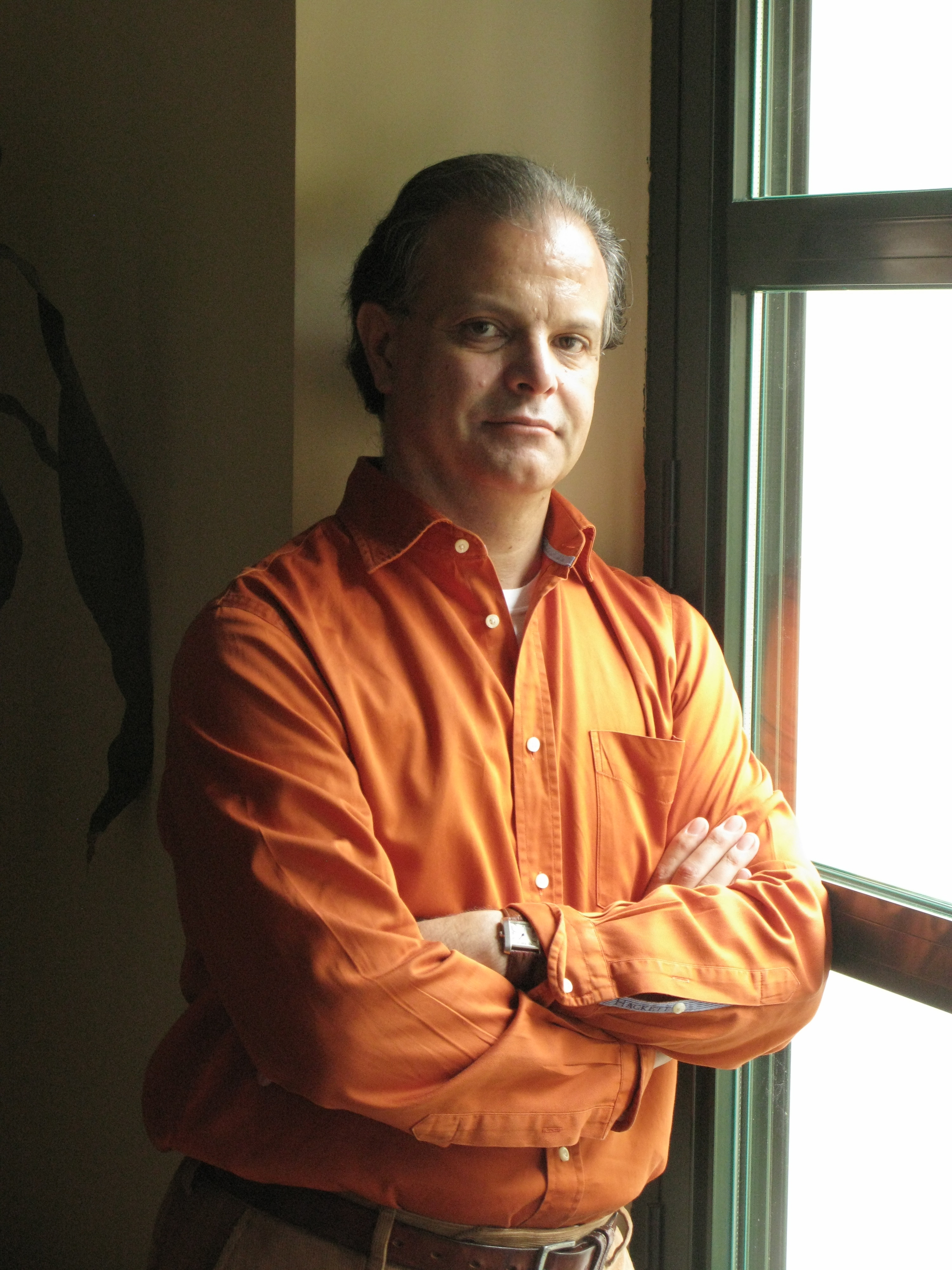 El escritor chileno Carlos Franz, Madrid, diciembre de 2010